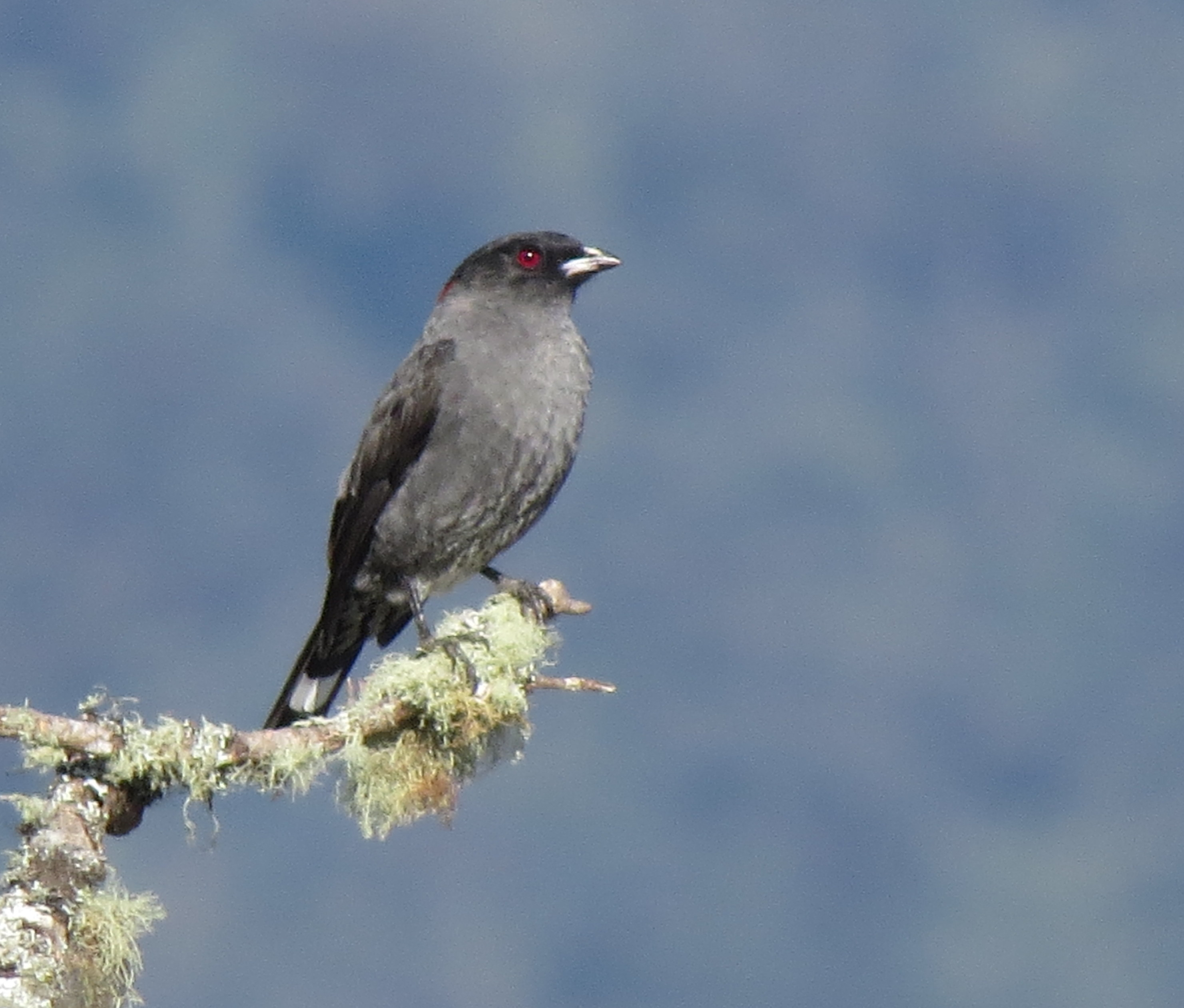 Ampelion rubrocristata (Cotinga crestirroja)